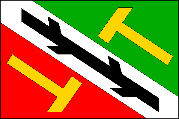 vlajka, Polnička, okres Žďár nad Sázavou